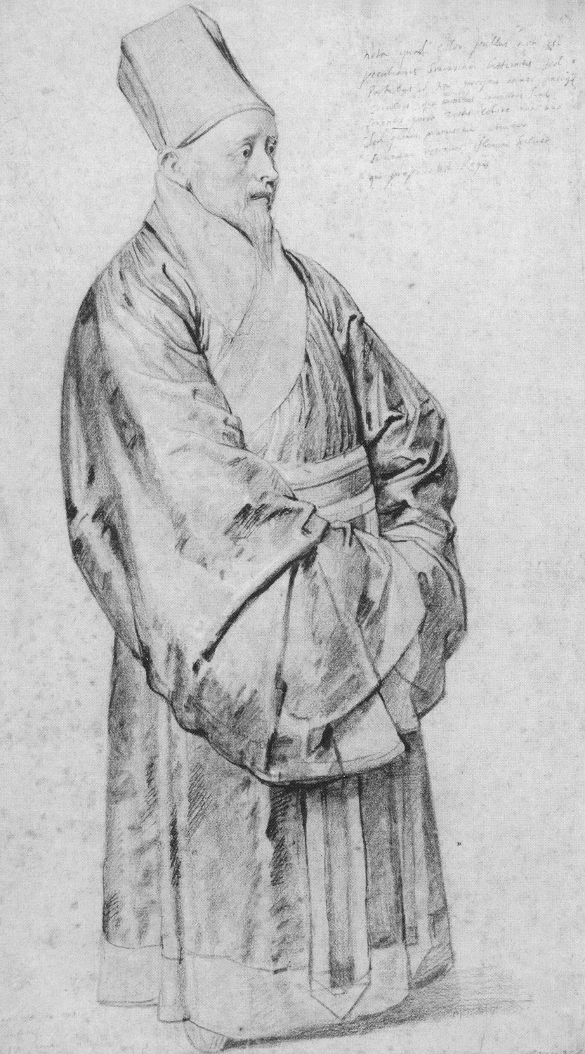 Missionare treten in Europa in chinesischen Gewändern auf und erregen großes Aufsehen